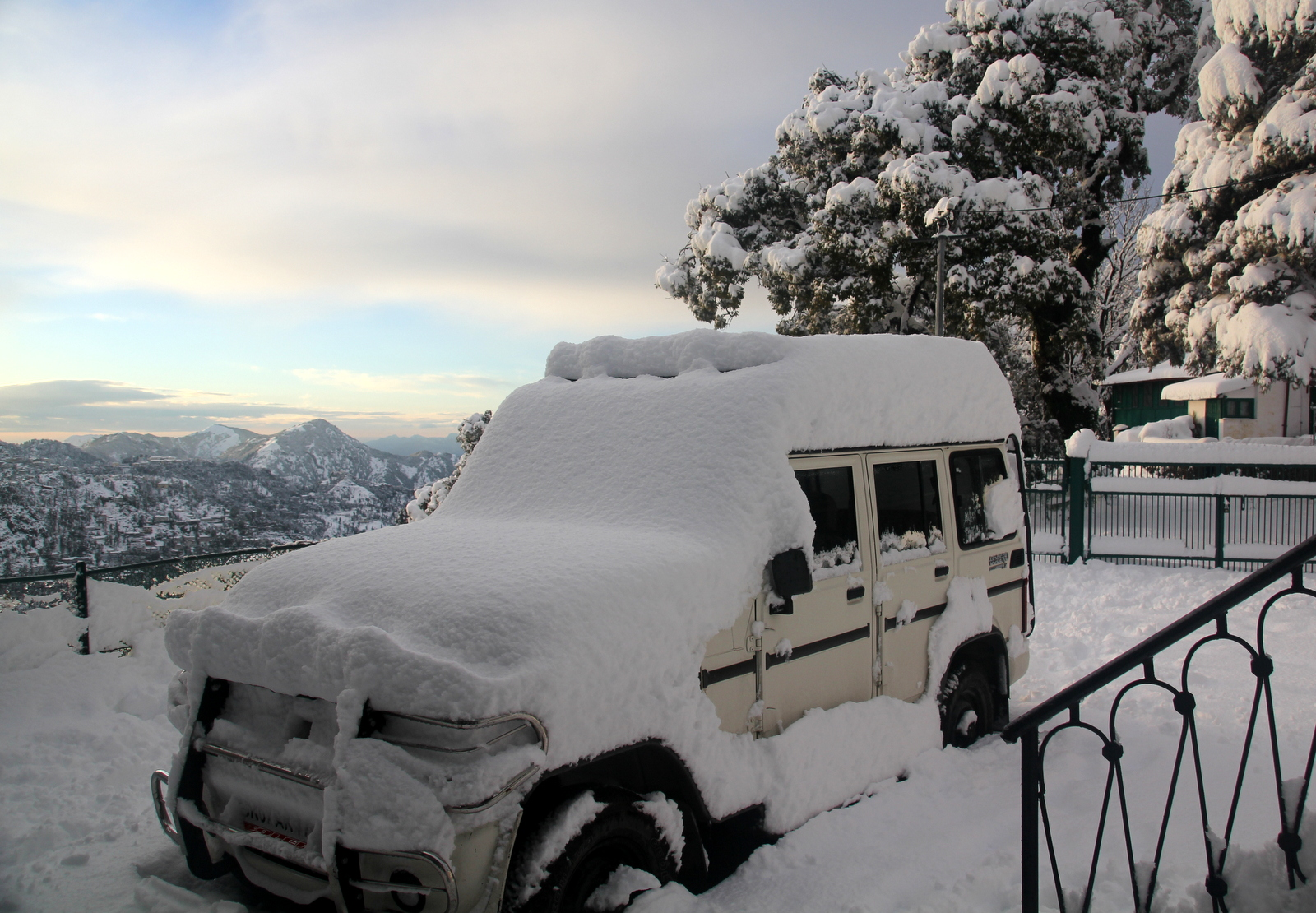 Bolero Under Snow